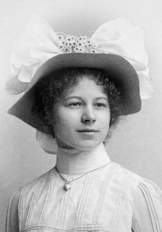 Božena Hlinková – Liebscherová, česká amatérská malířka a kreslířka